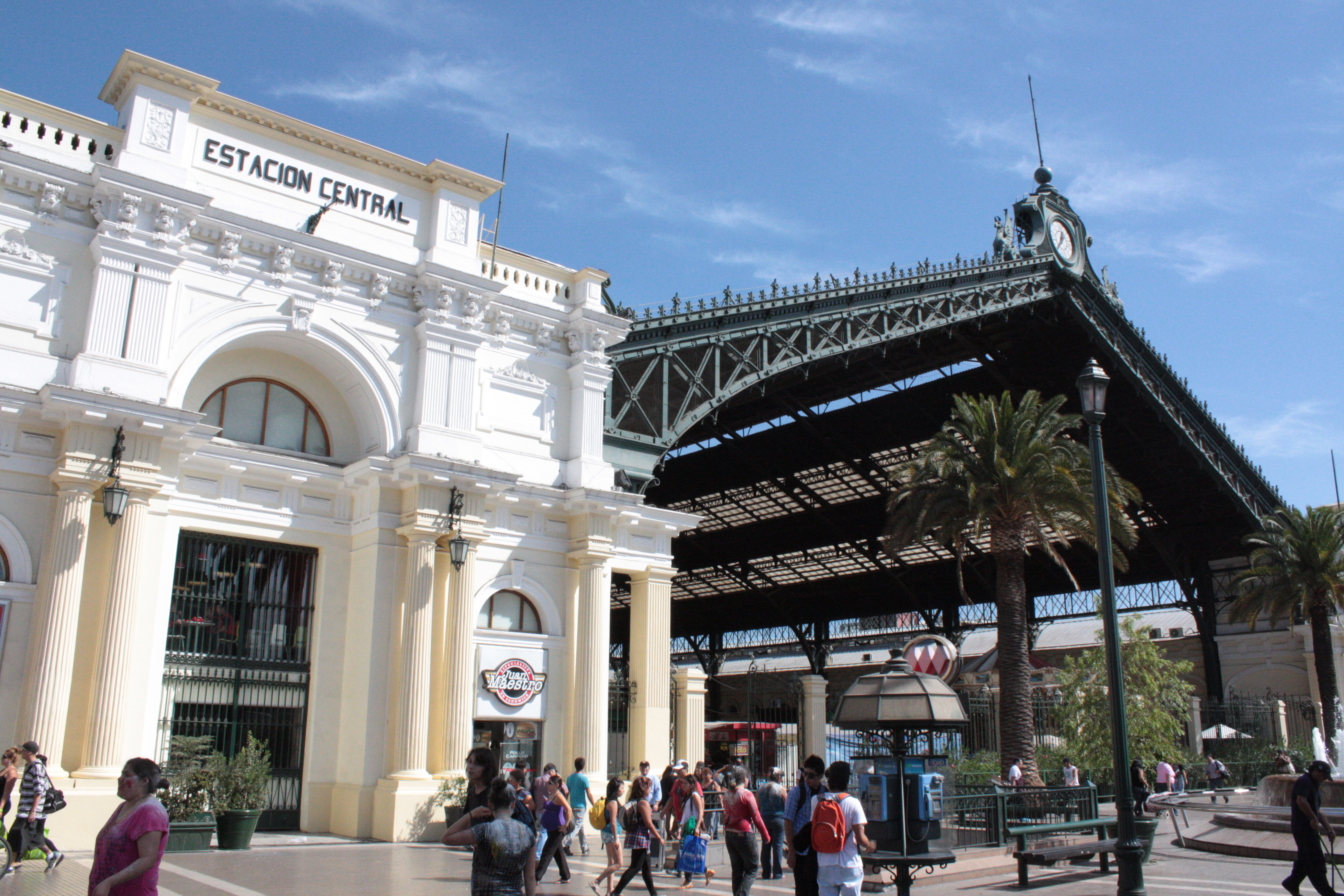 Vista desde el oriente.